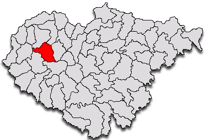 Categorie:Hărţi ale judeţului Sălaj